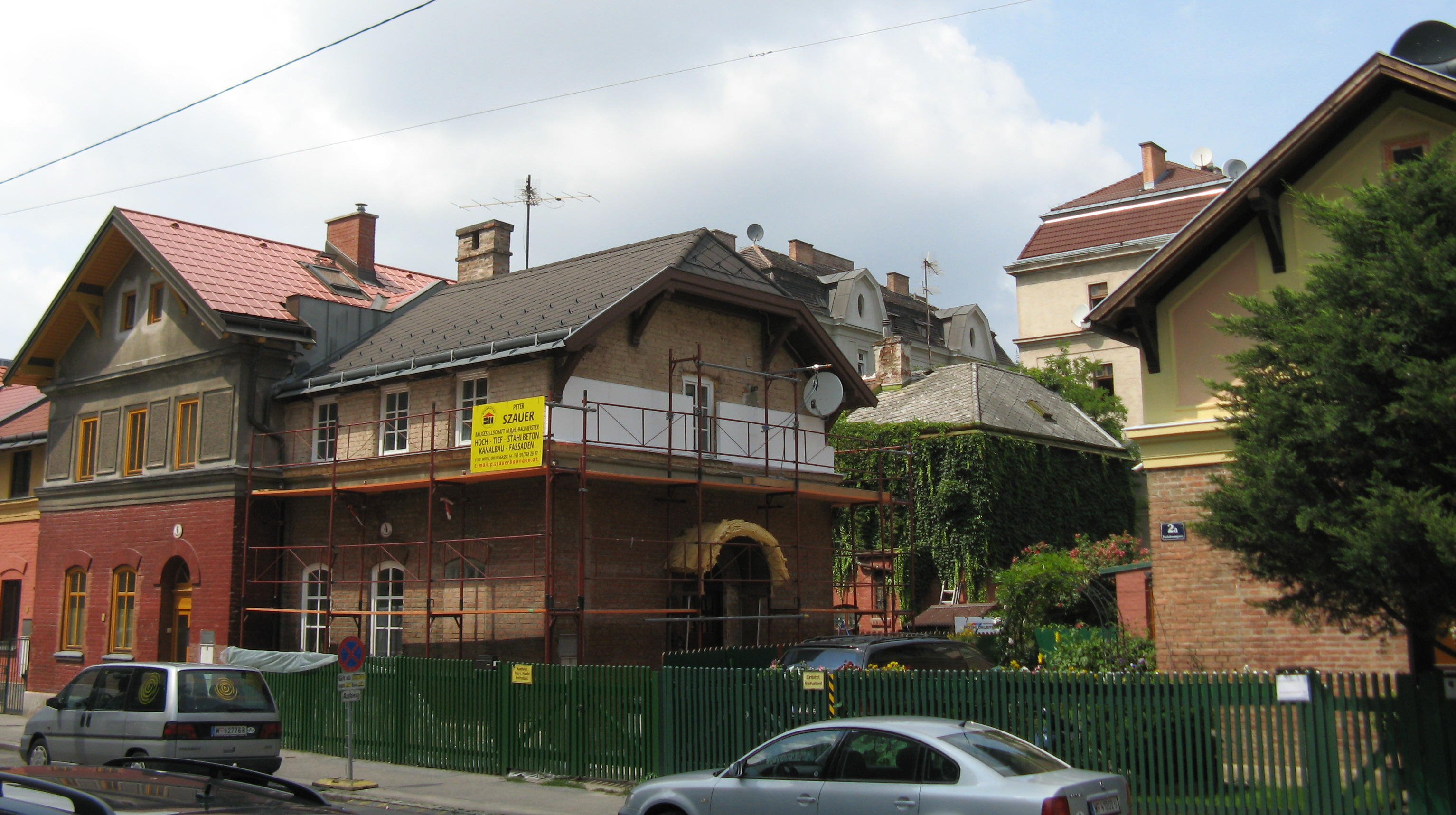 Arbeiter-Einfamilienhäuser (1886/87) von Josef Unger, Absberggasse 16-20, Wien-Favoriten